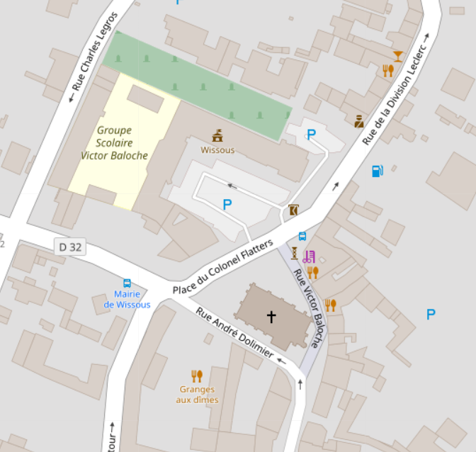 Carte OpenStreetMap (OSM) du centre-ville de Wissous, France. This map may be incomplete, and may contain errors. Don't rely solely on it for navigation.